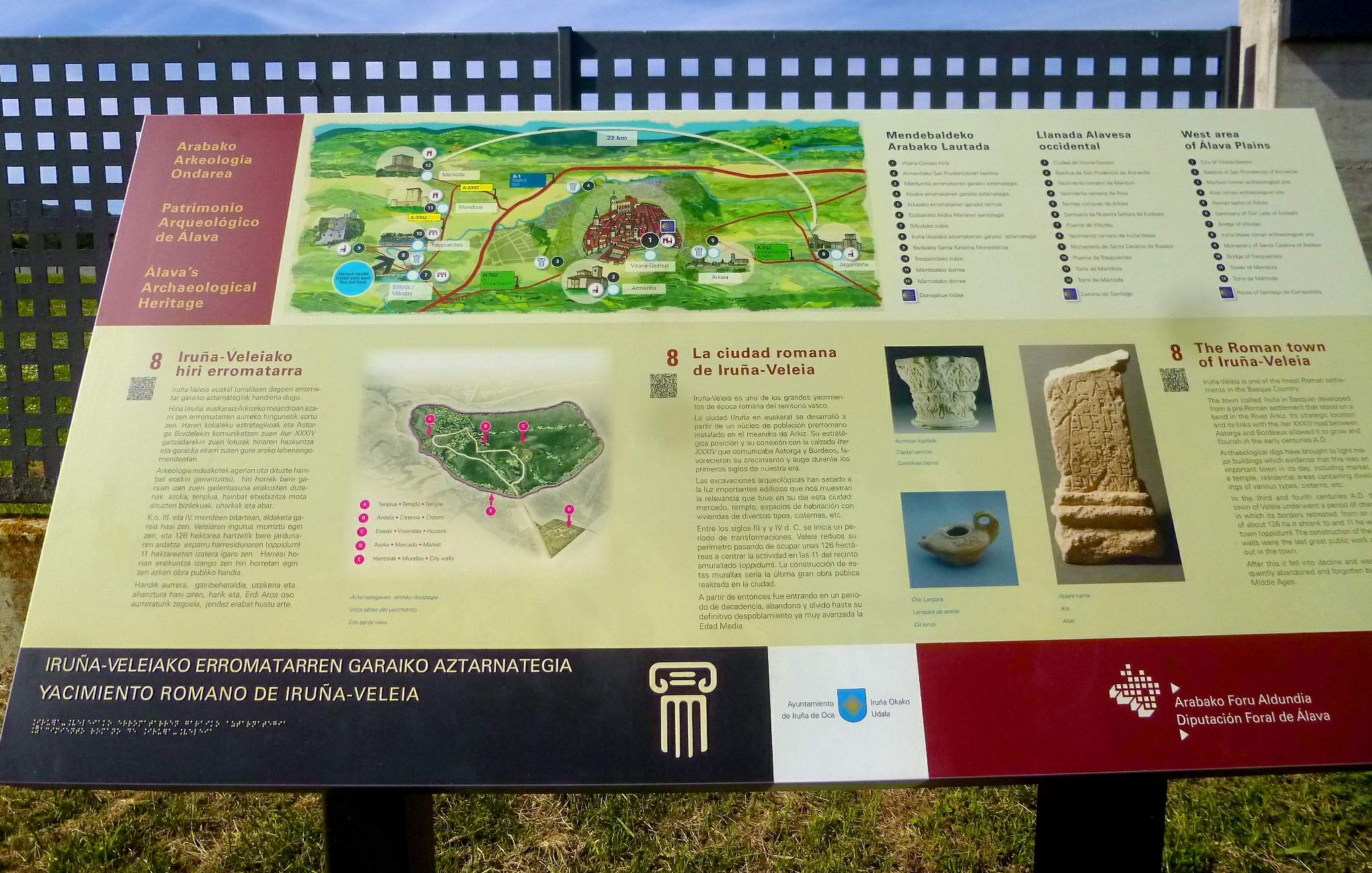 Yacimiento del oppidum romano de Iruña-Veleia (Álava)